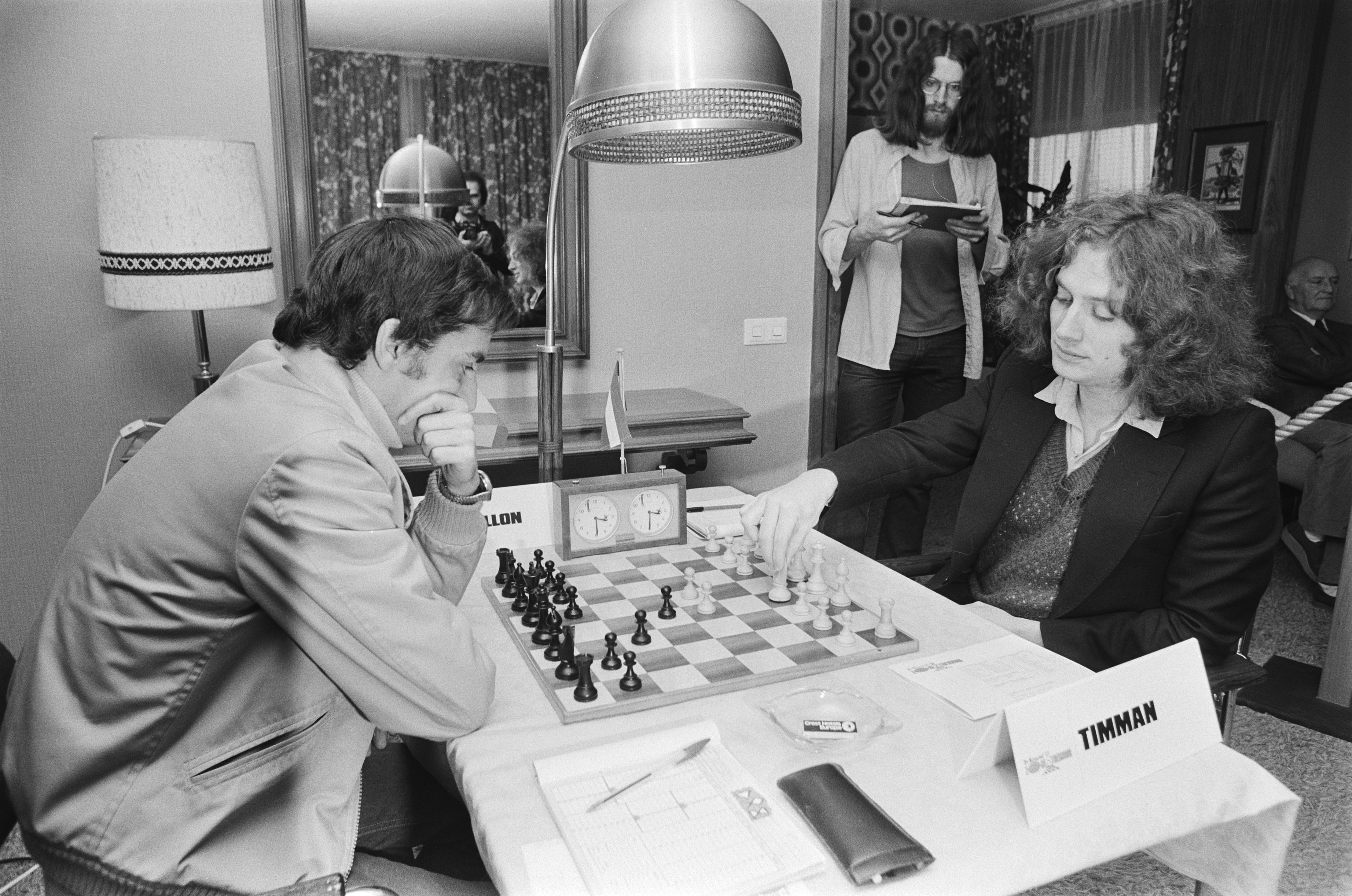 Collectie / Archief : Fotocollectie Anefo Reportage / Serie : [ onbekend ] Beschrijving : Zoneschaaktoernooi in Amsterdam; Sinterklaas kijkt bij Jan Timman vs Juan Manuel Bellon Lopez Datum : 4 december 1978 Locatie : Amsterdam, Noord-Holland Trefwoorden : schaken, toernooien Persoonsnaam : Timman, Jan Fotograaf : Suyk, Koen / Anefo Auteursrechthebbende : Nationaal Archief Materiaalsoort : Negatief (zwart/wit) Nummer archiefinventaris : bekijk toegang 2.24.01.05 Bestanddeelnummer : 930-0274